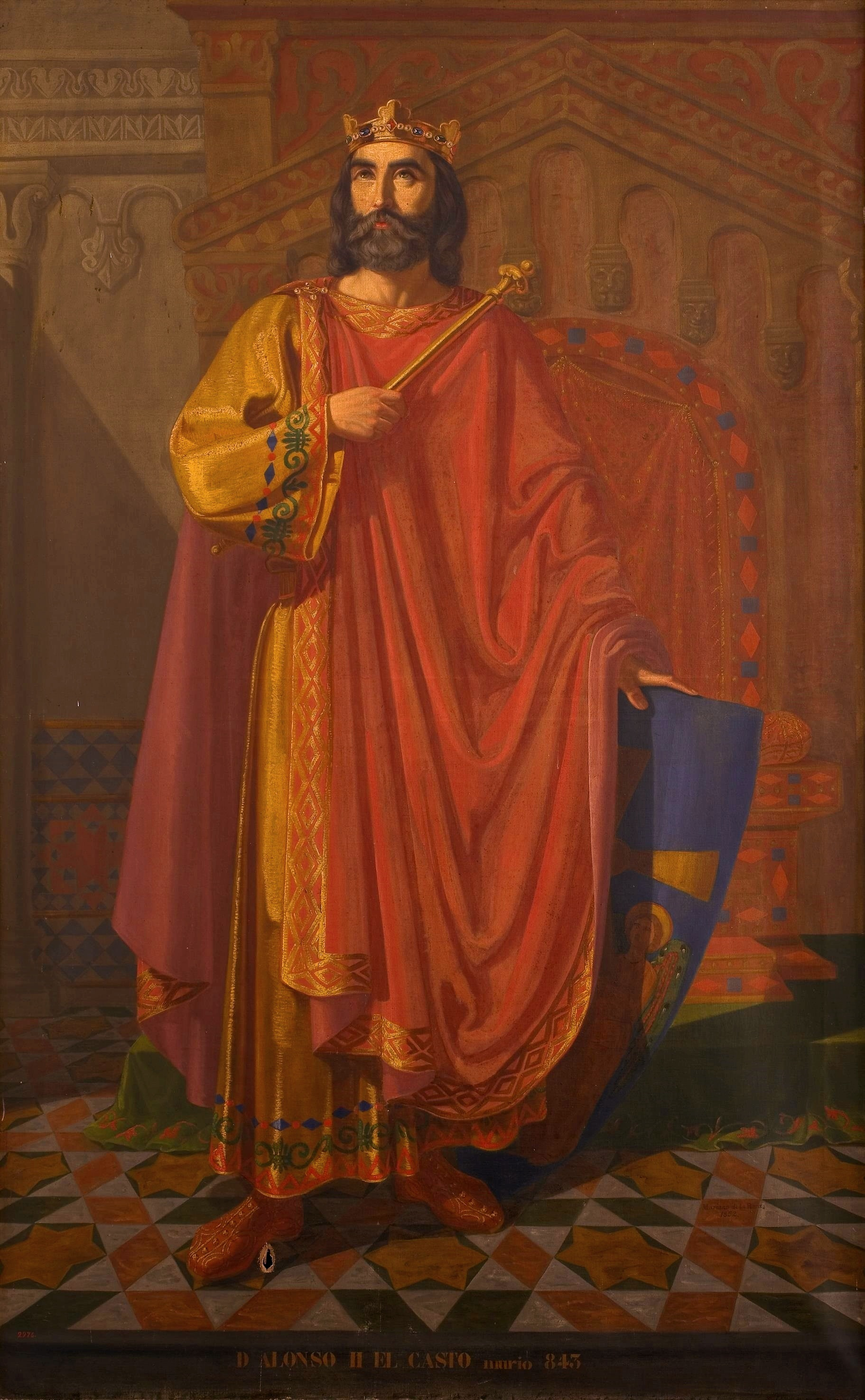 Retrato imaginario de Alfonso II el Casto (c. 760-842), rey de Asturias e hijo del rey Fruela I de Asturias y de la reina Munia de Álava.